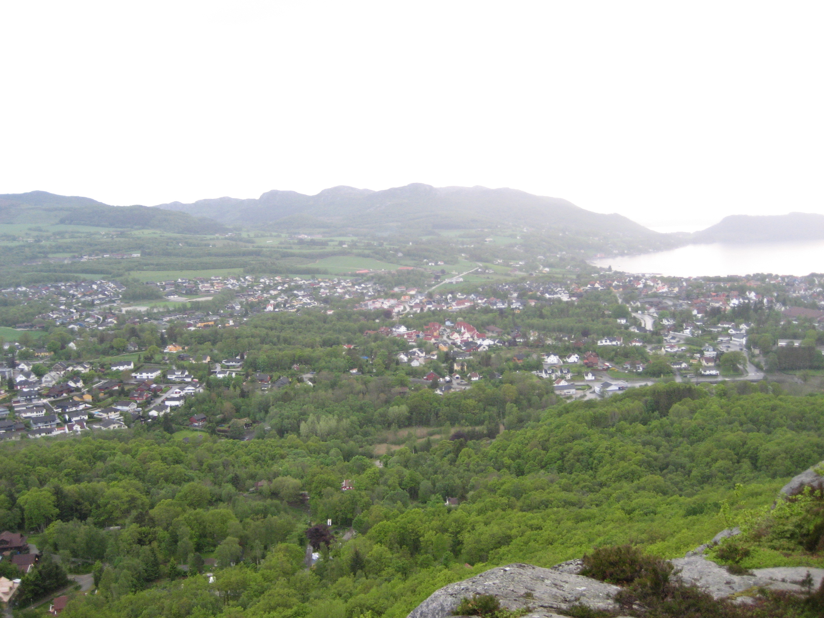 Hommersåk, Sandnes, Rogaland, Norway